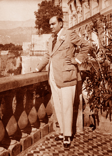 Enrico Caruso (1873-1921), Italian tenor.